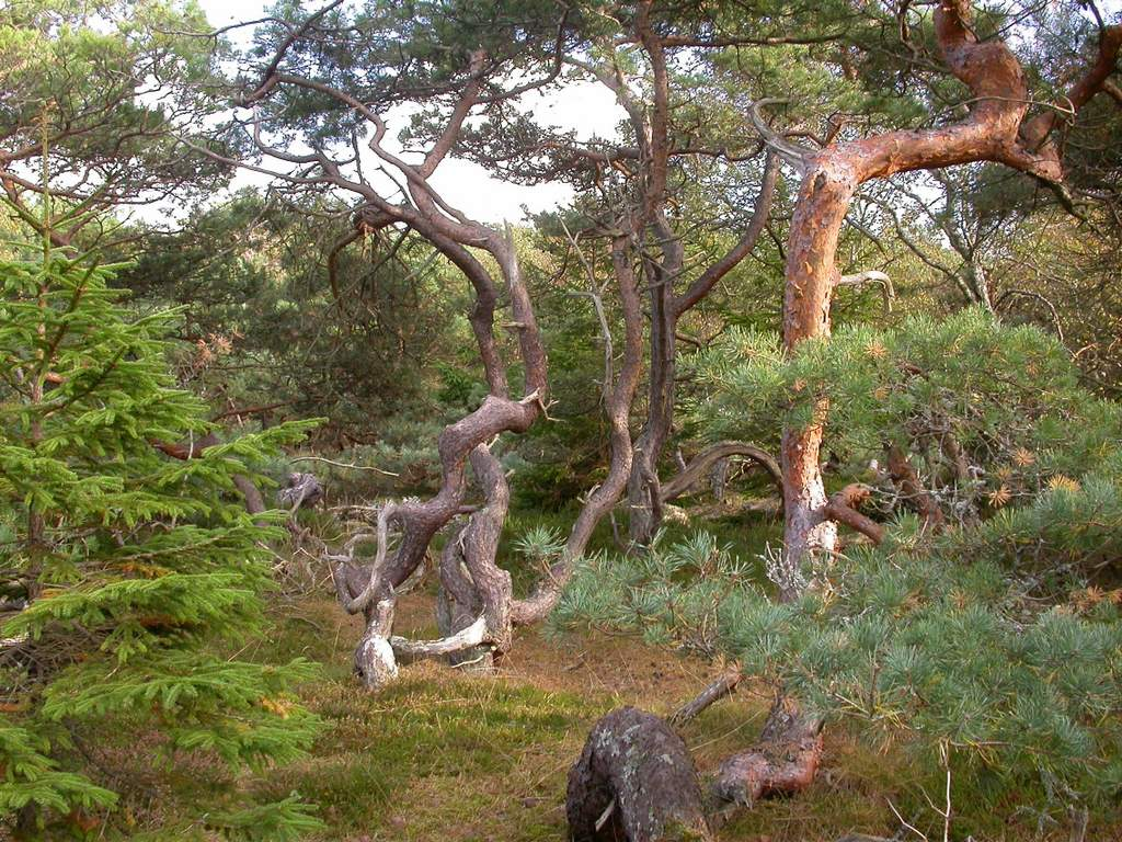 Tisvilde Hegn in Nordsjælland, Denmark